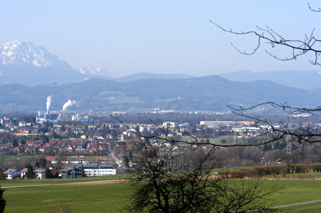 Blick von Maria Plain über Salzburg zum bayrischen Berg Högl.